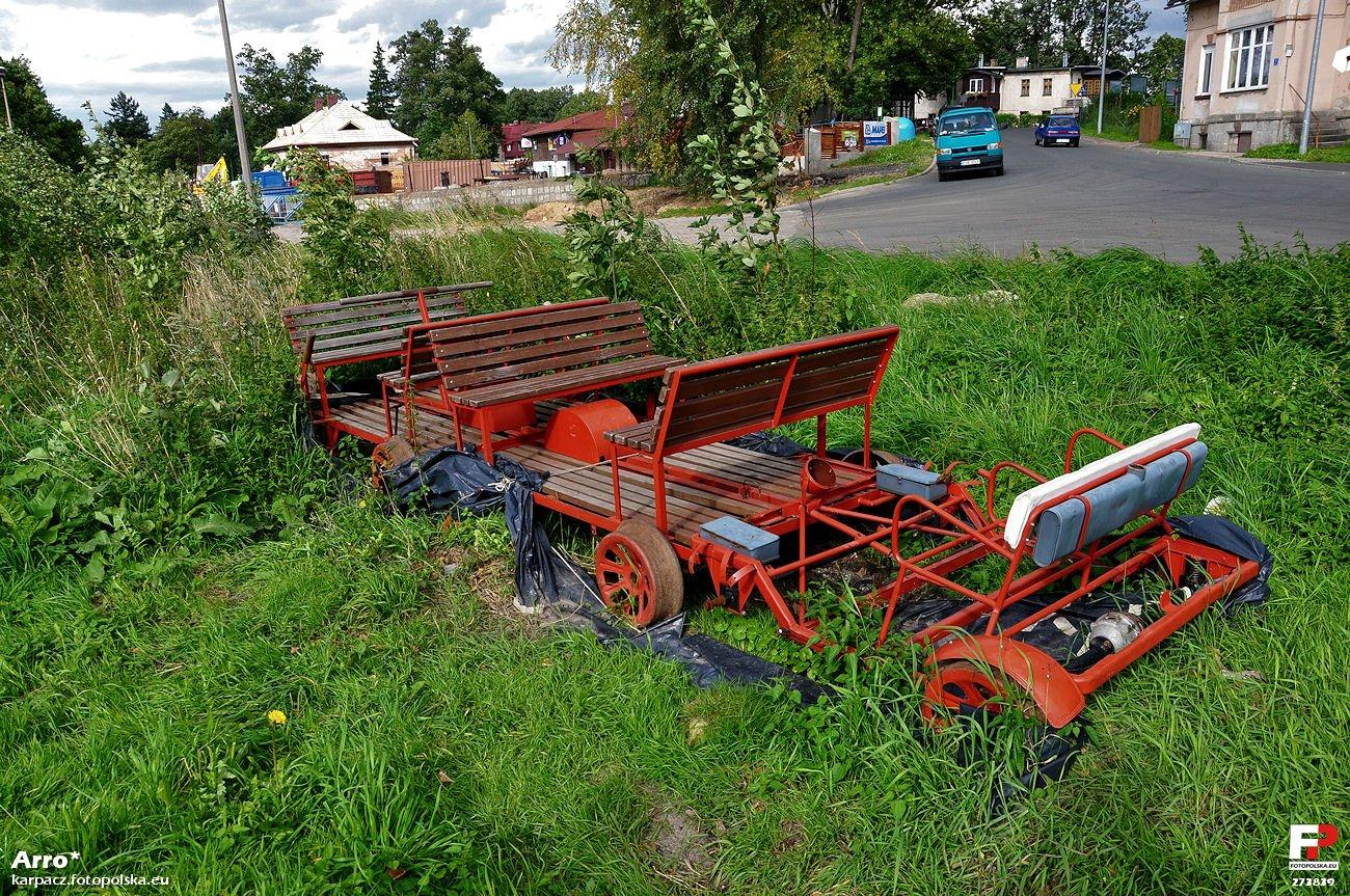 Karpacka "kolekcja" drezyn.